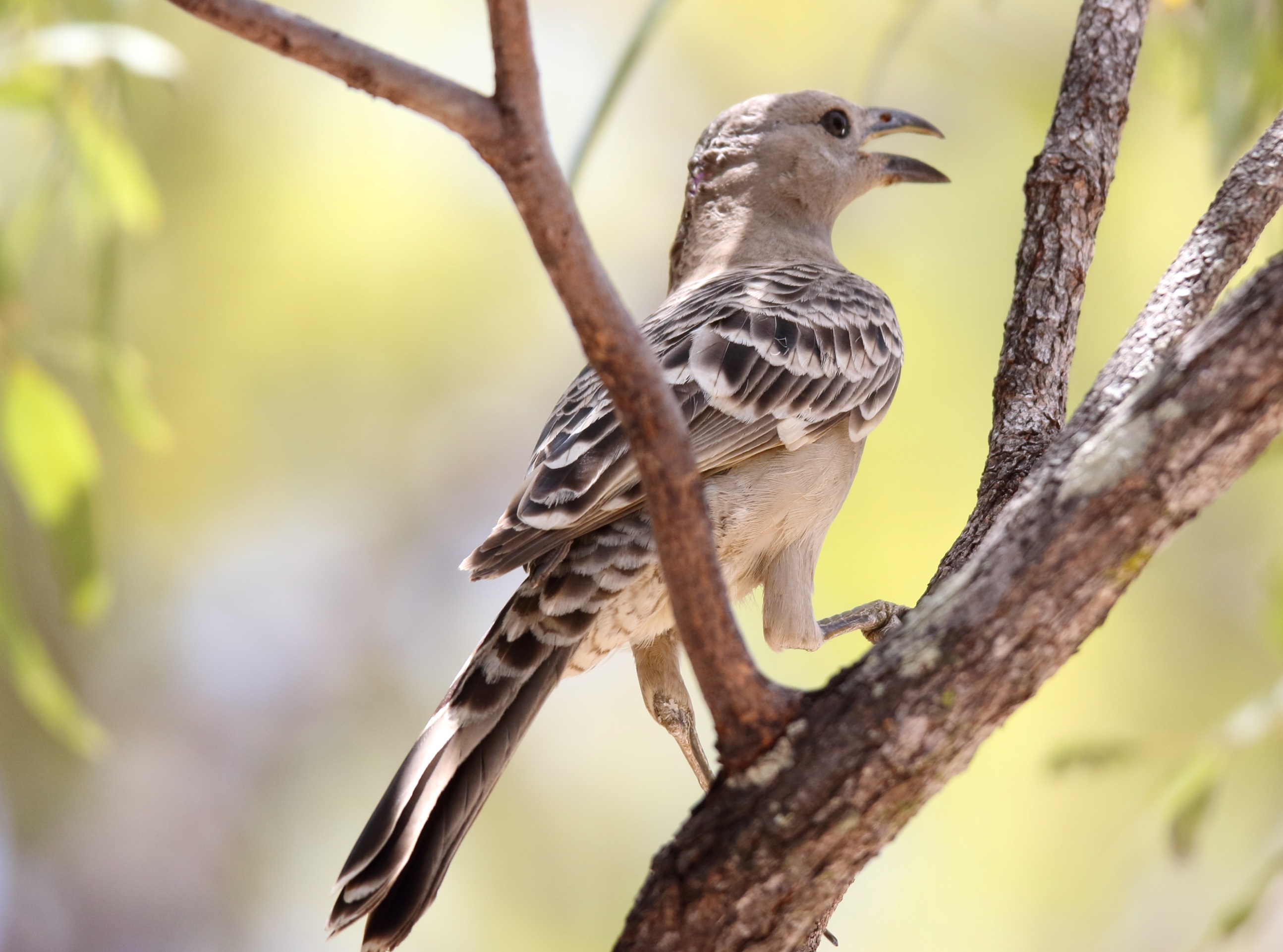 Great Bowerbird (Chlamydera nuchalis)